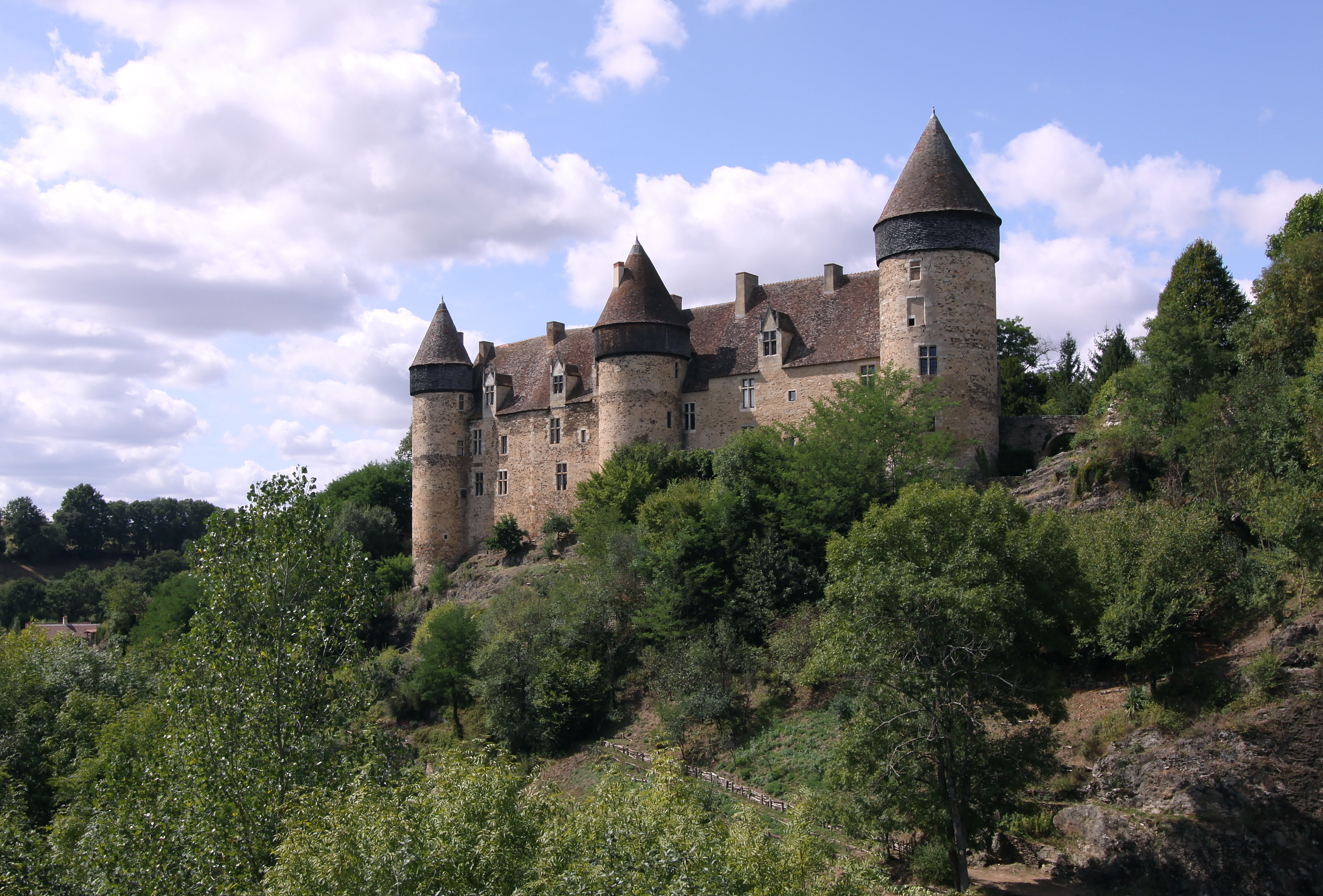 Le château de Culan, en Berry. Façade orientale donnant sur le vallon de l'Arnon.